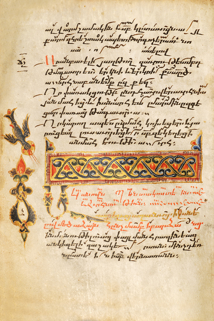 Medieval Armenian Hymnaire